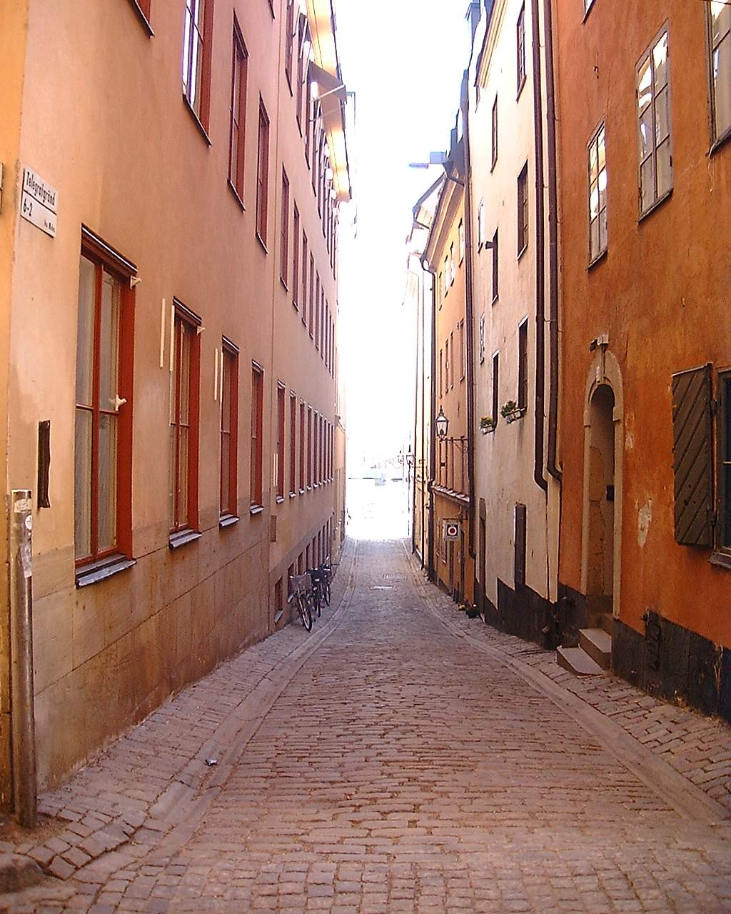 Telegrafgränd mot Skeppsbron, Gamla stan, Stockholm (kvarteret Bootes till höger).